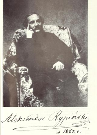 Аляксандр Рыпінскі